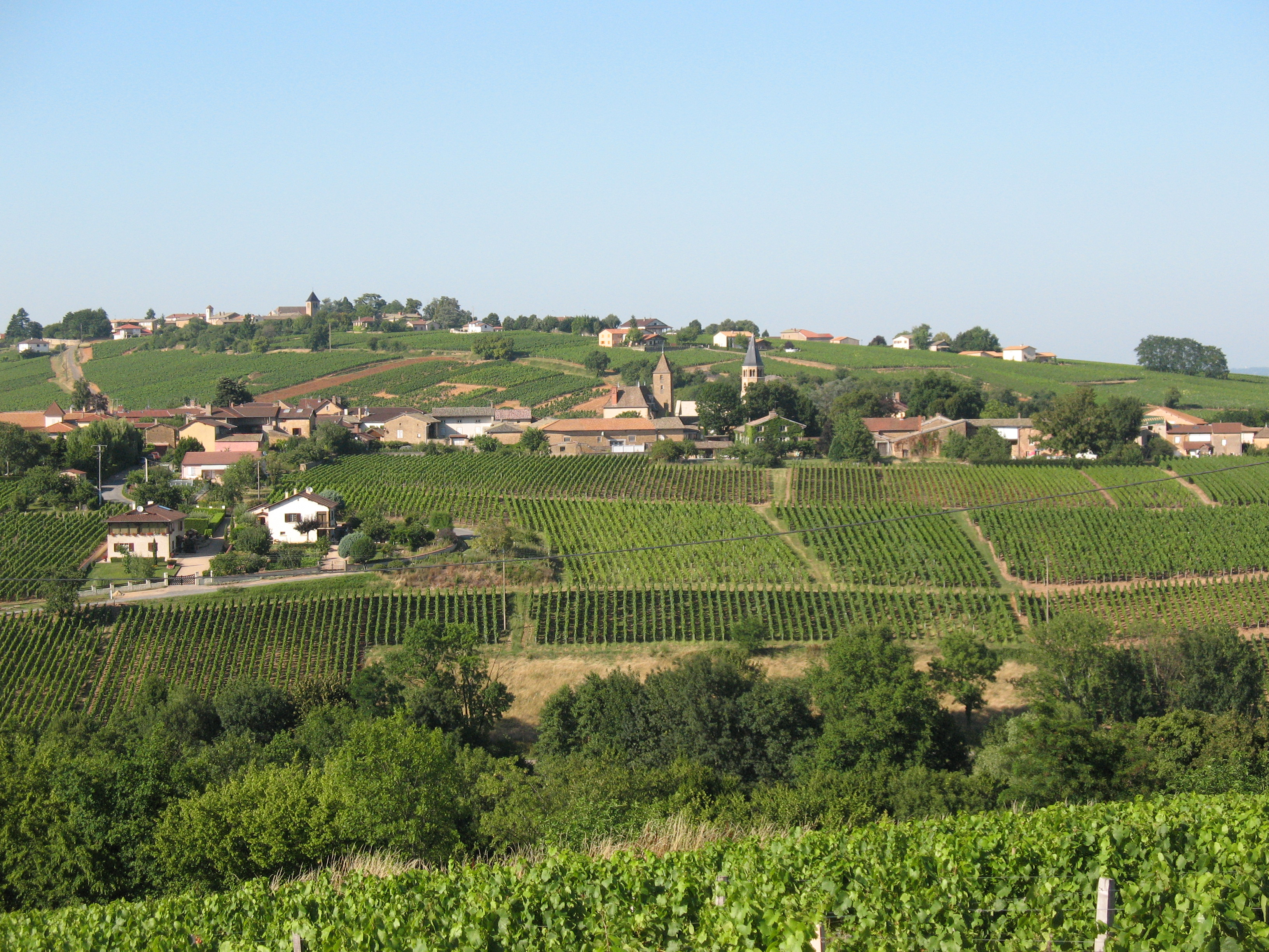 Vue Panoramique de la commune de Chânes prise de Saint-Amour Bellevue